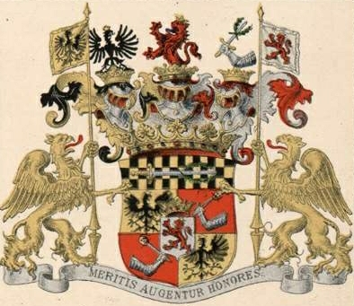 Lacy suguvõsa krahvivapp